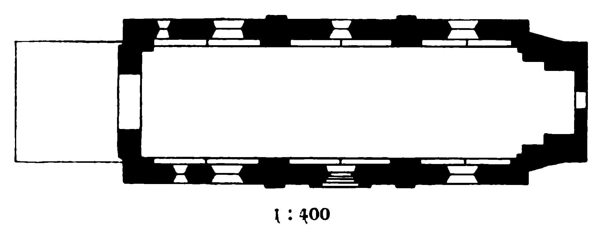 Grundriss der Kirche St. Vitus in Lette, Stadt Oelde